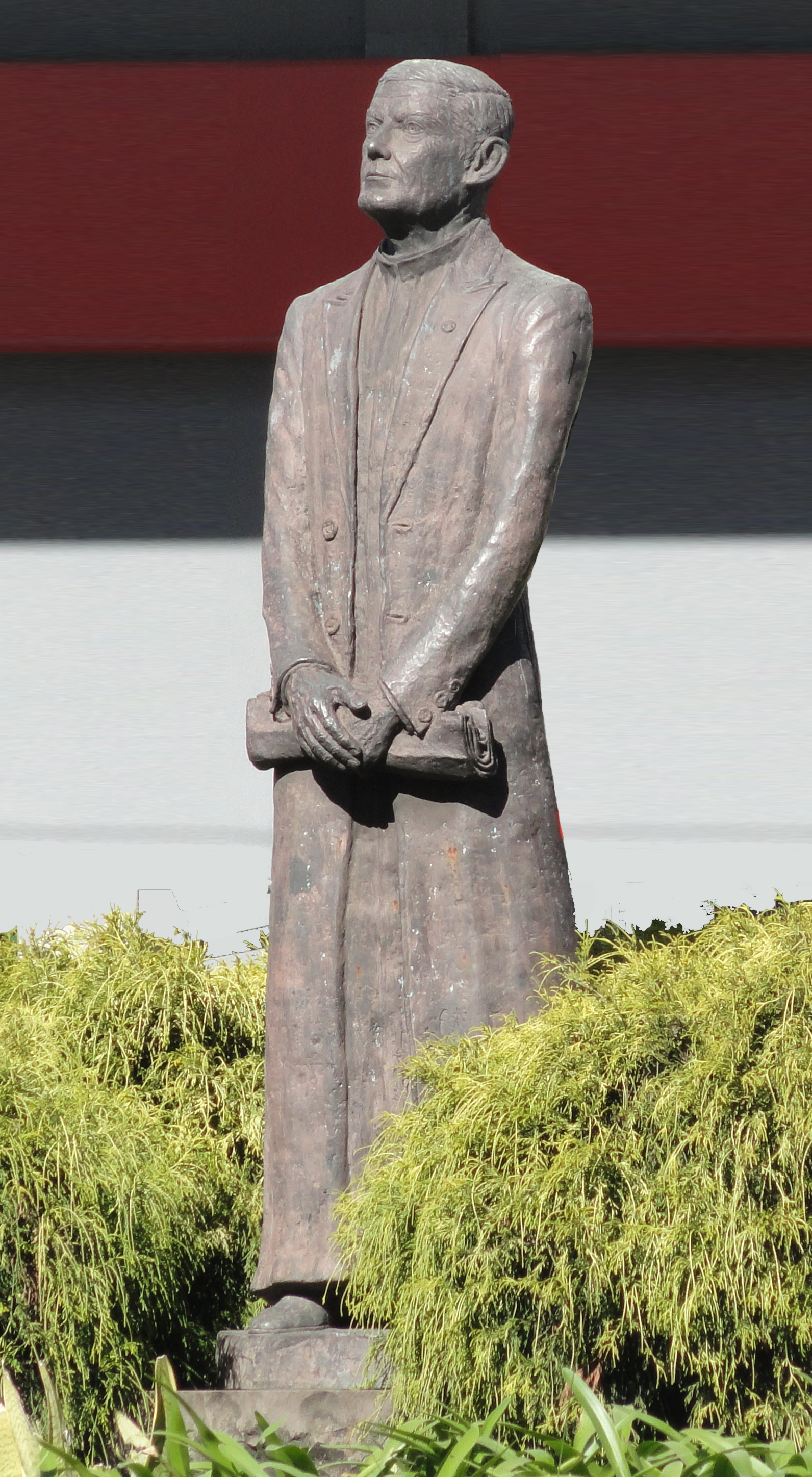 Monumento ao Padre Eugênio Giordani, no Largo Padre Eugênio Giordani.